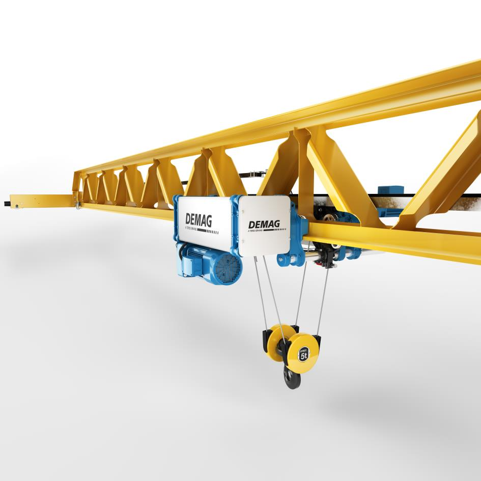 Seilzug DMR an V-Profilkran